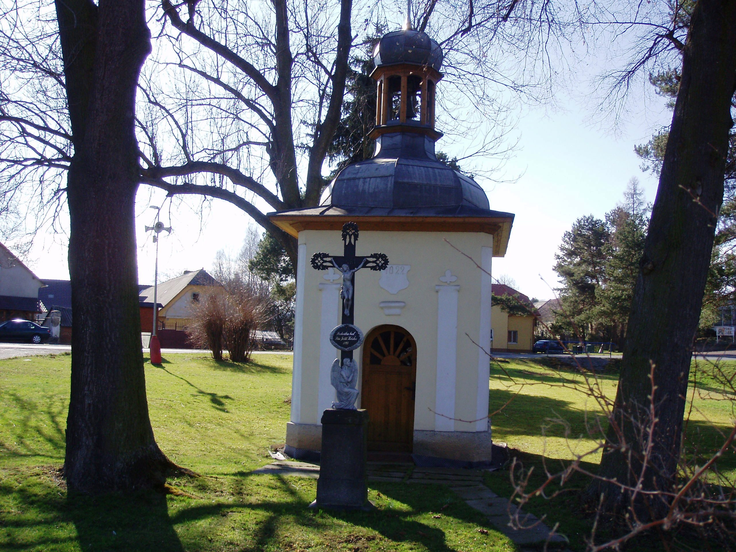 Lhota u Příbramě - kaple z roku 1829